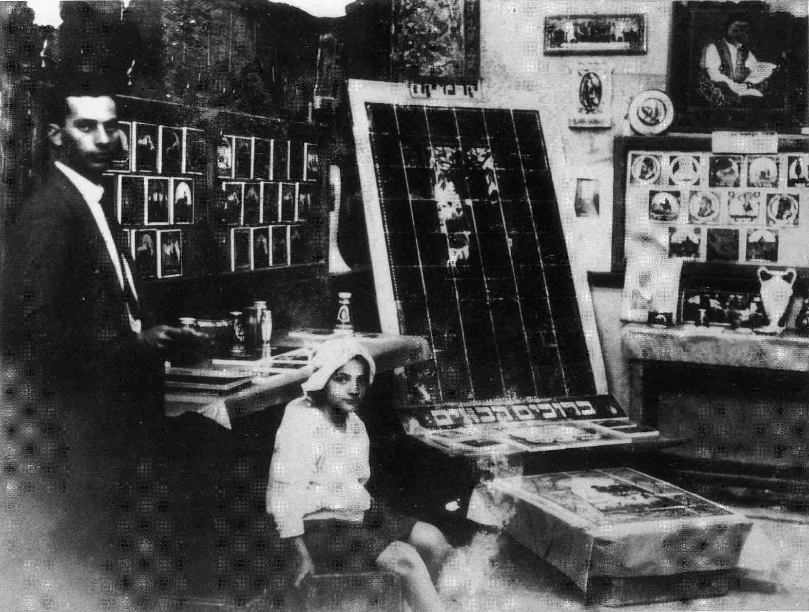 אריחים וכלי נוי, שלטים וקישוטי חזיתות בתים מתוצרת הסדנה. עומד משמאל - י' אייזנברג, יושבת - זהרה שץ. אמצע שונות העשרים. ארכיון העיר, ירושלים. Tiles and ornamental vessels, plaques and decorations for house facades, produced at the workshop. standing left - Y. Eisenberg; seated: Zahara Schatz. mid-twenties. Jerusalem city archives.